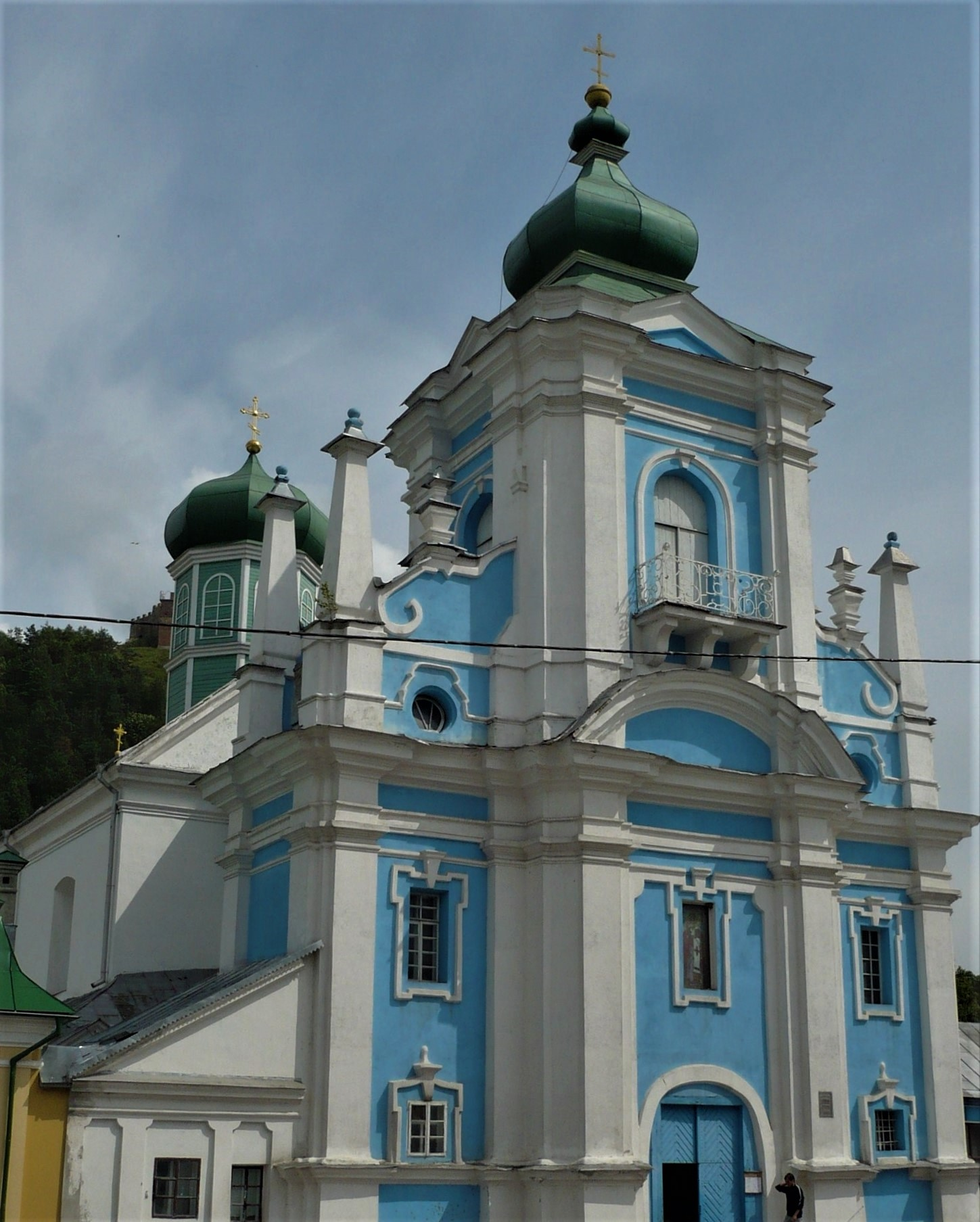 Kościół franciszkanów, ob. pw. św. Mikołaja w Krzemieńcu